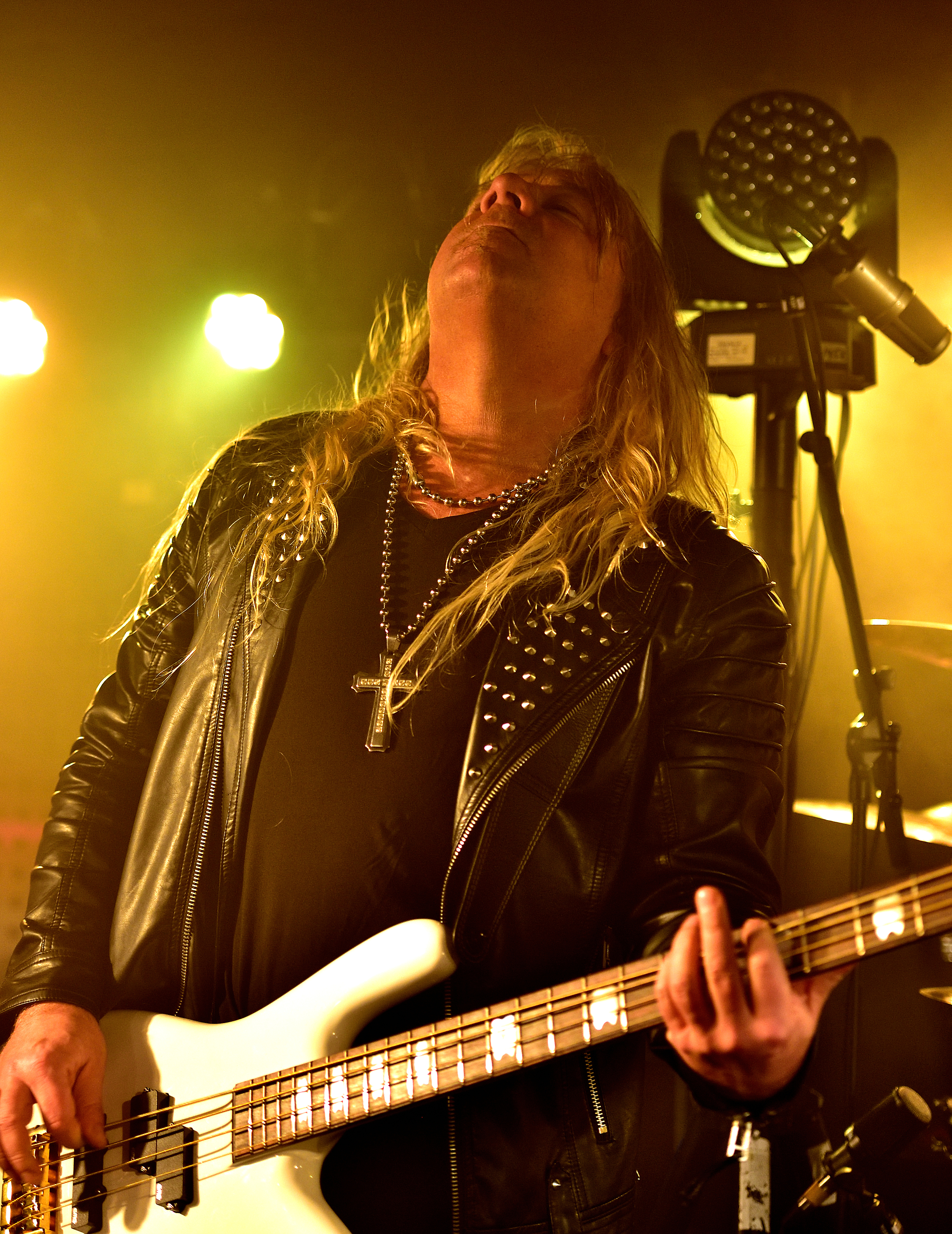 Primal Fear live im Logo Hamburg